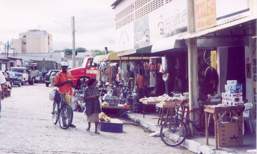 Markt in Arcoverde-PE, Brasilien